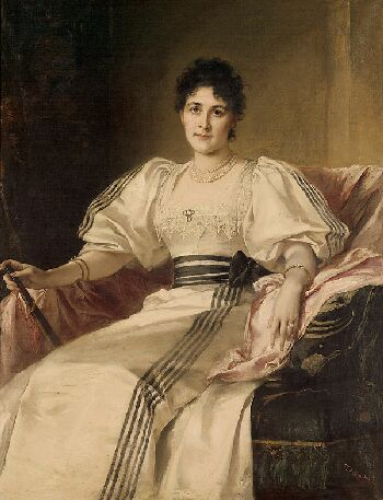 Bildnis Clara von Wätjen (geb. Vautier, Tochter des Malers Benjamin Vautier)